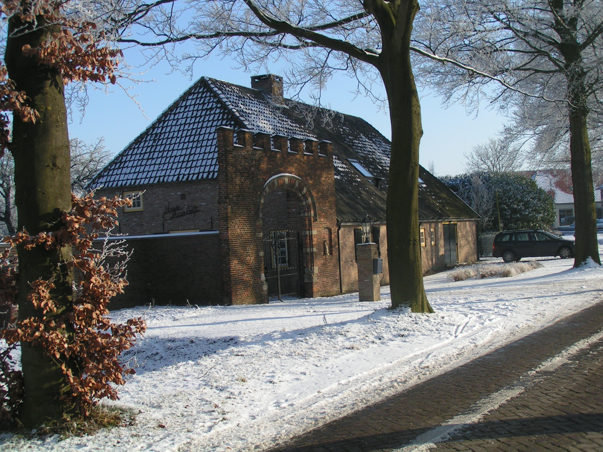 Poortgebouw kasteel Assendelft te Berlicum